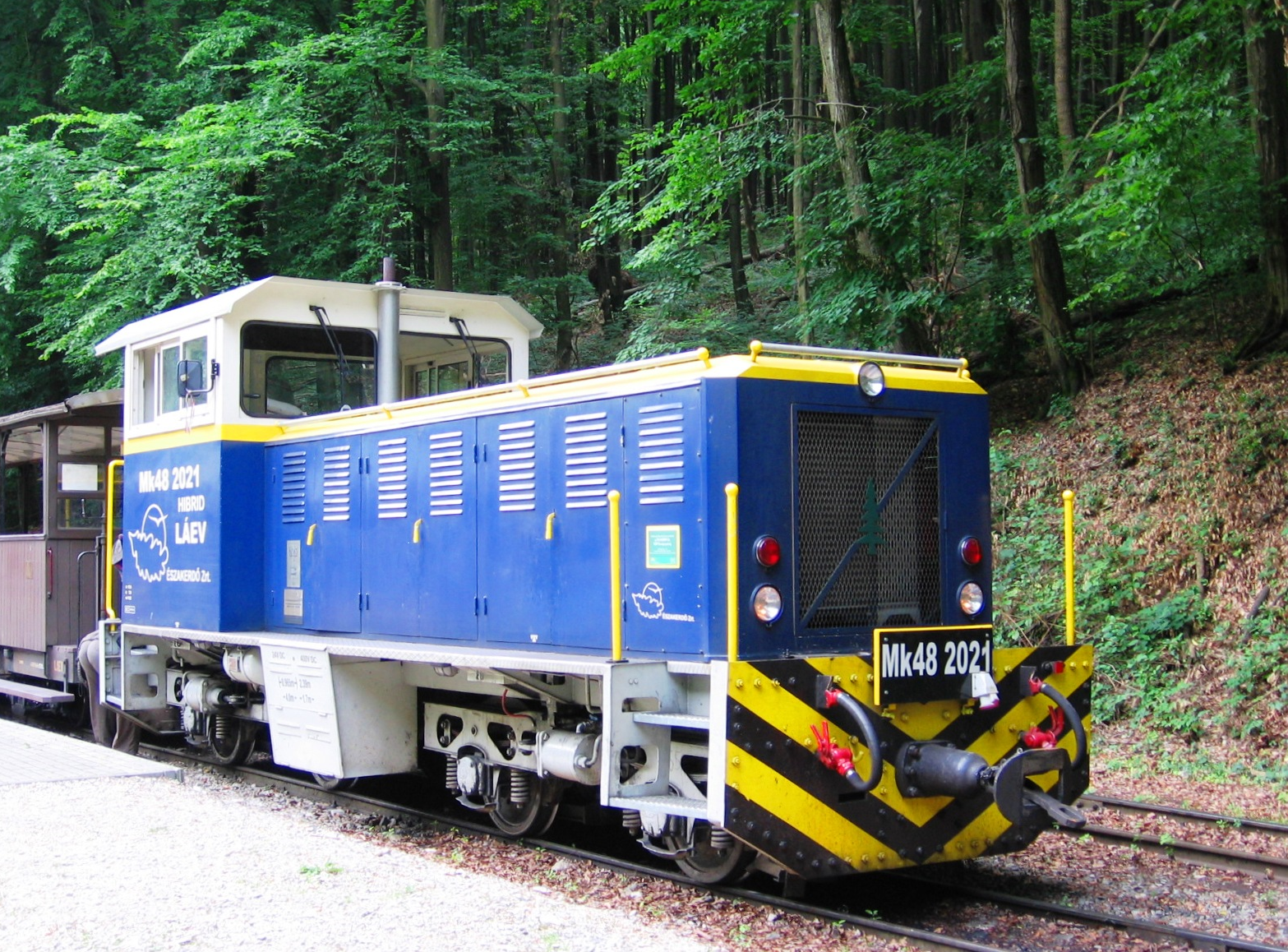 Garadna állomás a hibrid mozdonnyal